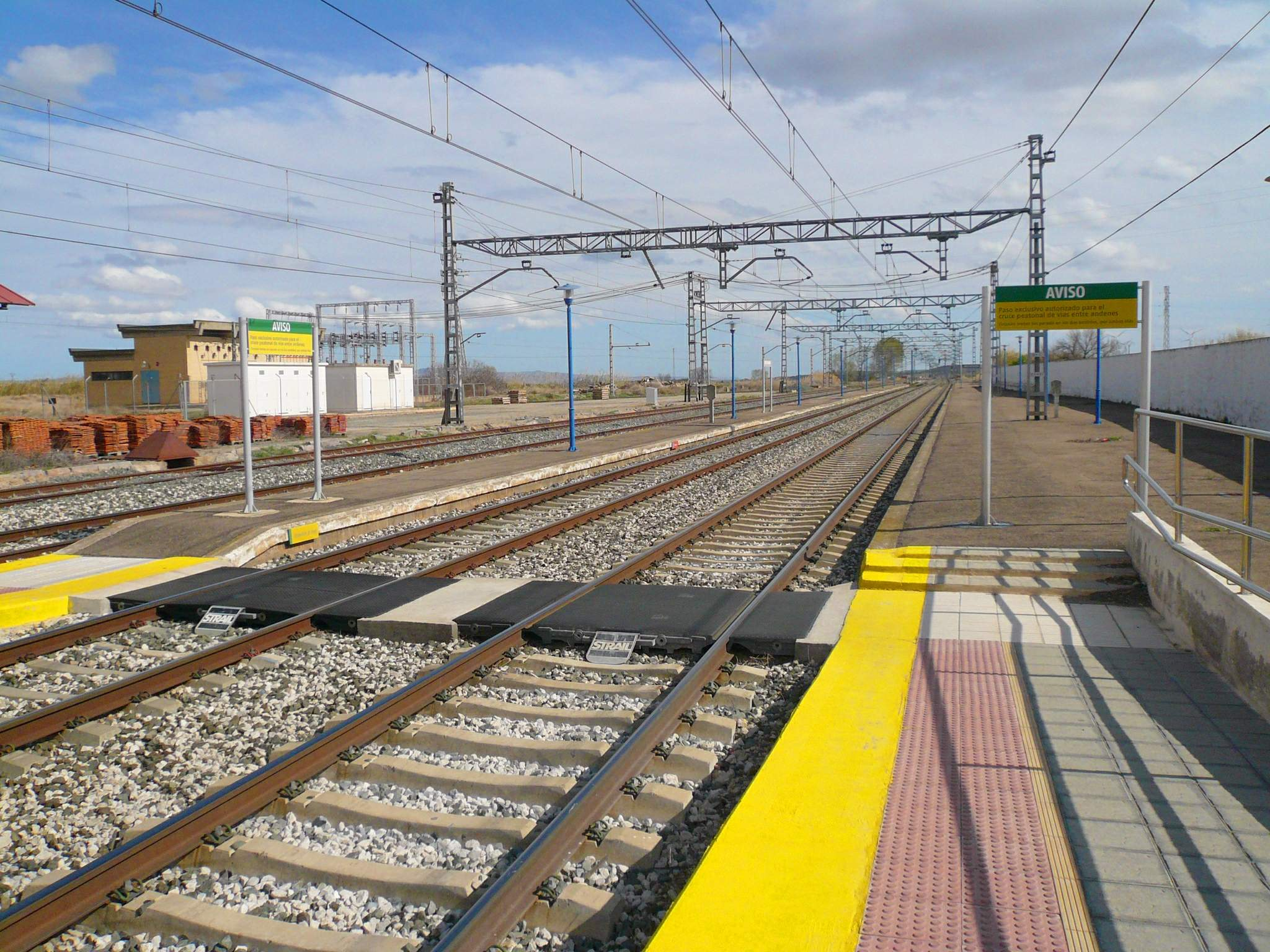 Estación de Cortes de Navarra